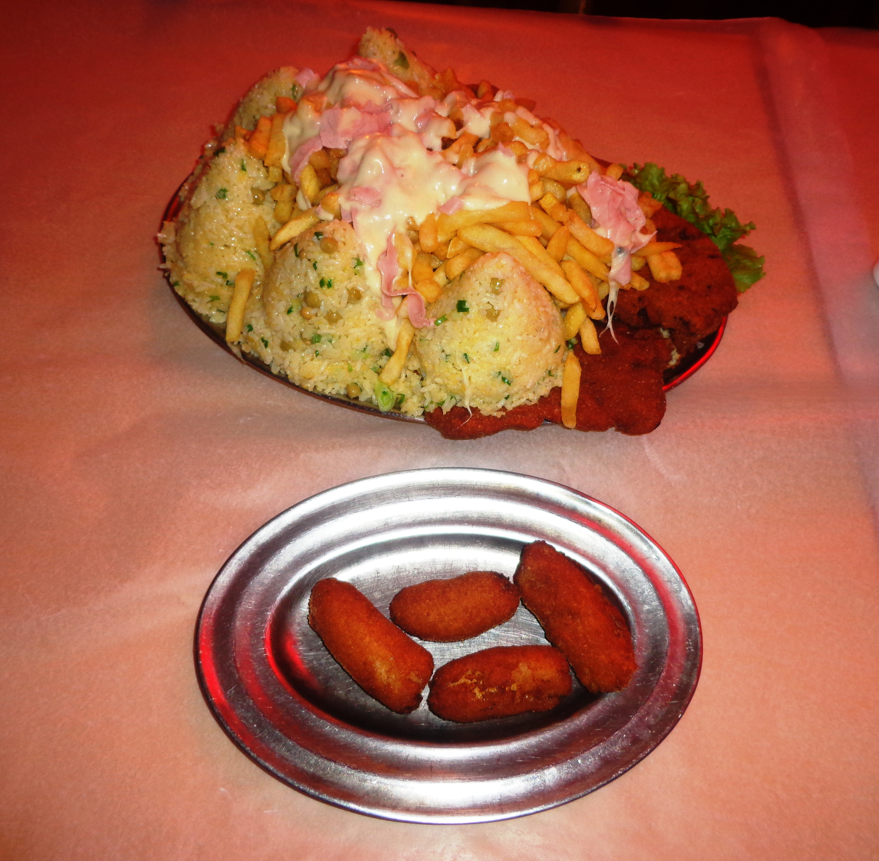 Prato típico da cidade de Franca, chamado "Filé a JK". O prato mostrado na fotografia foi servido no tradicional Restaurante Barão.